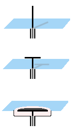 Eintstehung einer aerodynamisch günstigen Ringschlitzantenne aus einem λ/4- Dipol